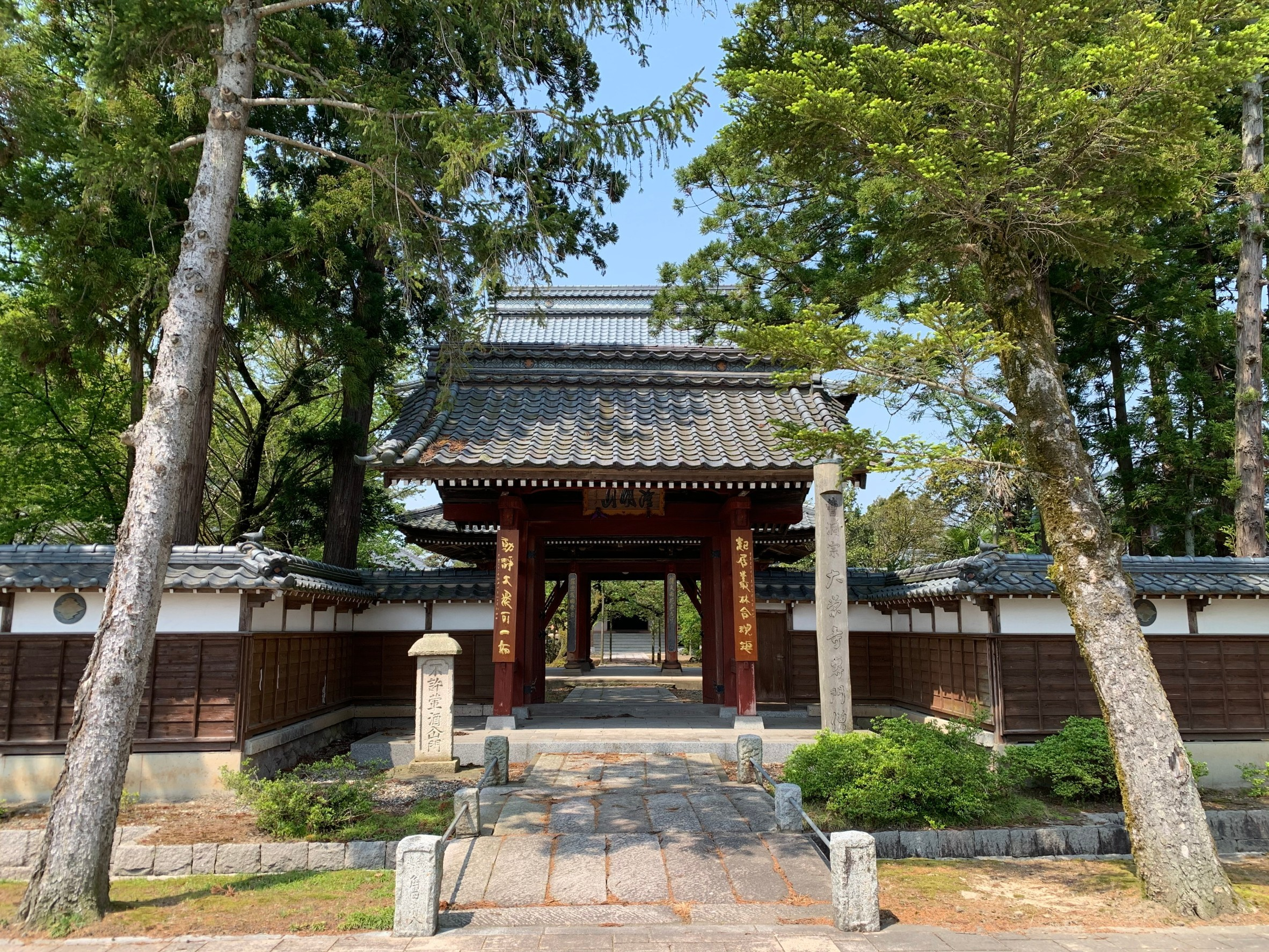 沢海の曹洞宗 大榮寺（2020年5月）